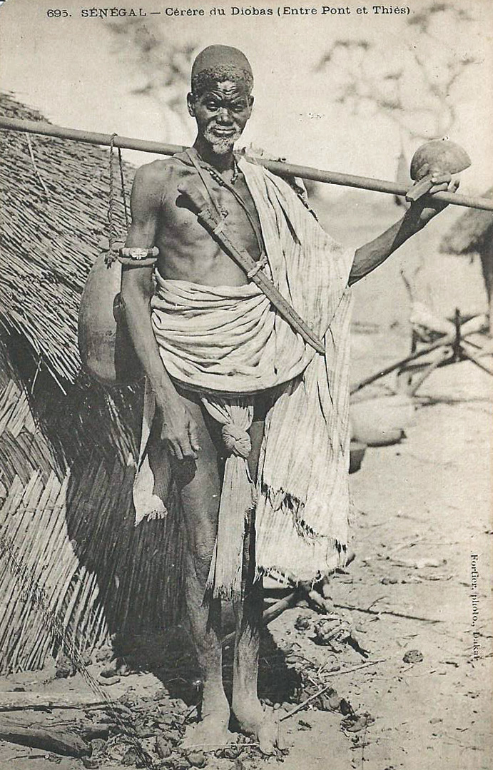 François-Edmond Fortier, Sénégal. Cérère du Diobas (entre Pont et Thiès). Afrique Occidentale - Sénégal.